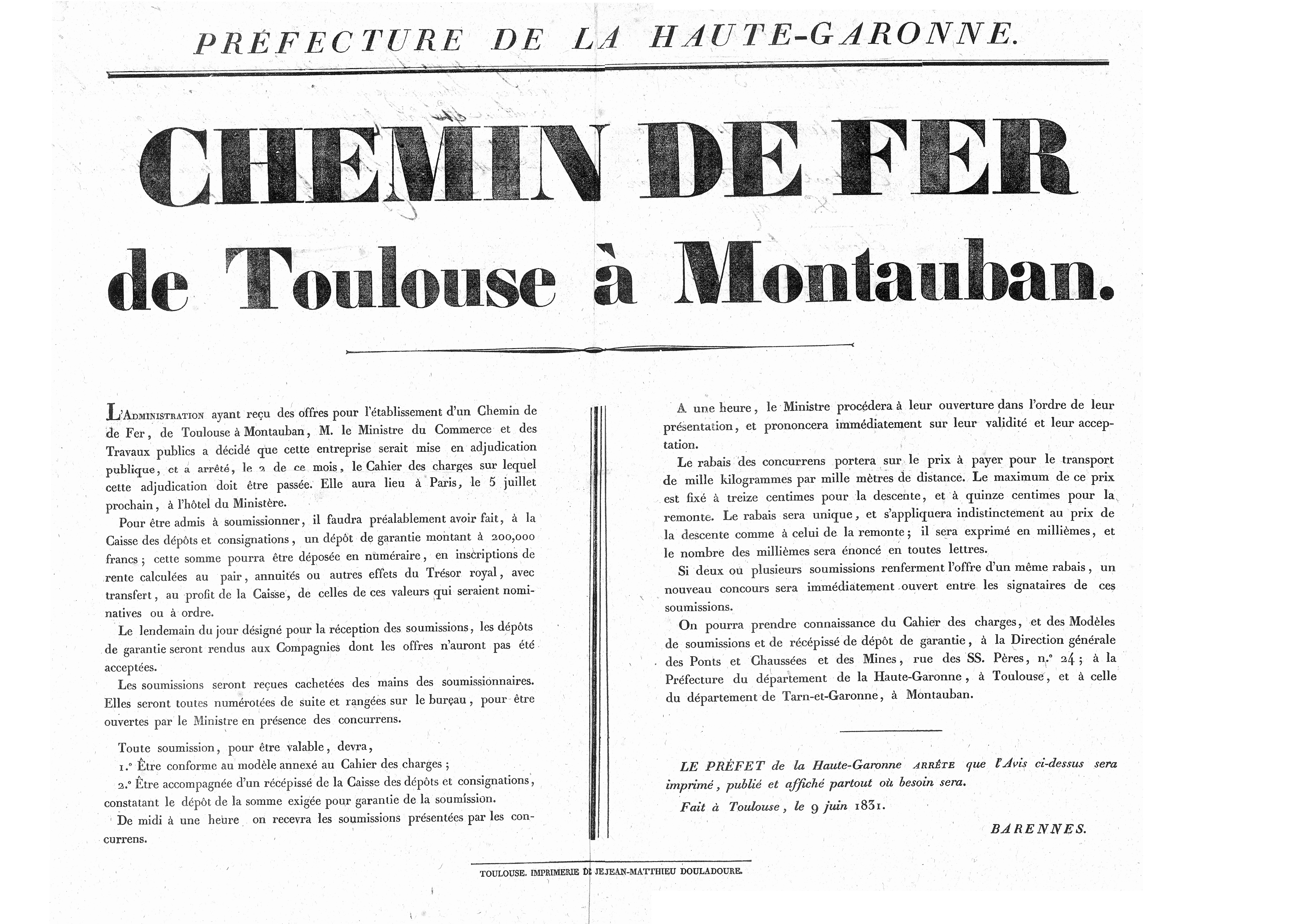 Chemin de fer de Toulouse à Montauban